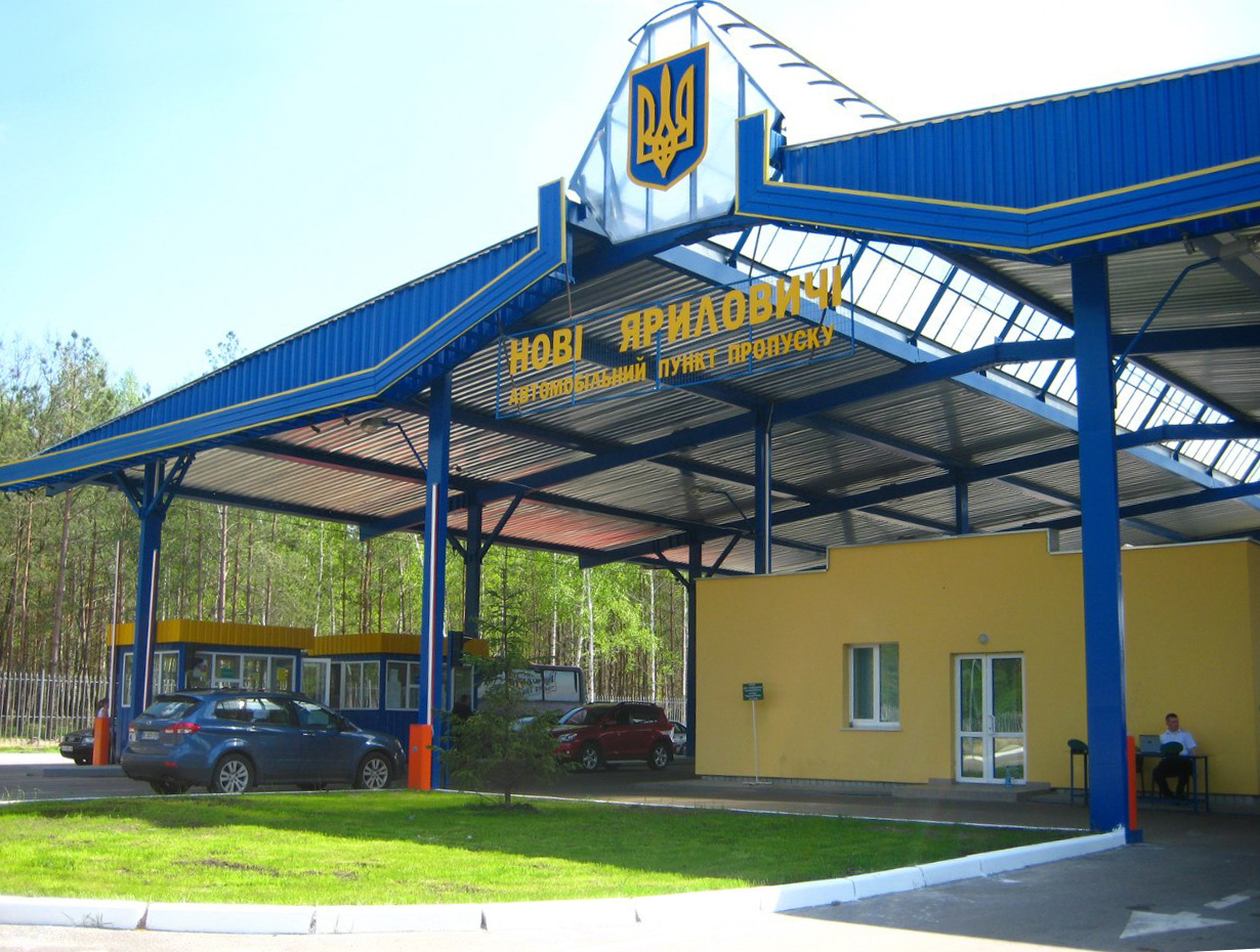 Таможенный пункт пропуска "Новые Ярыловичи" на Украинско-Белорусской границе. Черниговская область, Репкинский район.